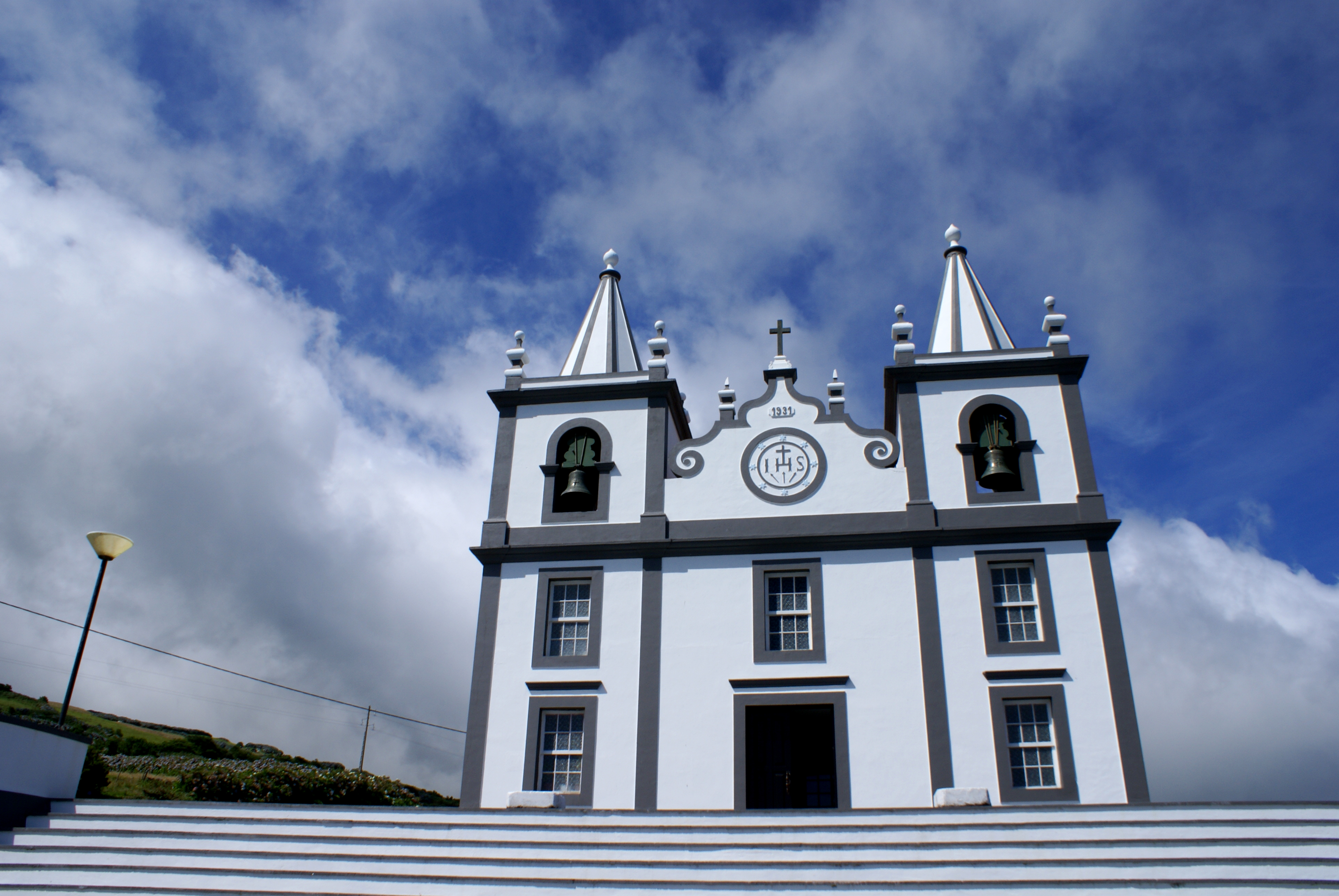 Igreja de Santo António, fachada, Velas, ilha de São Jorge, Açores